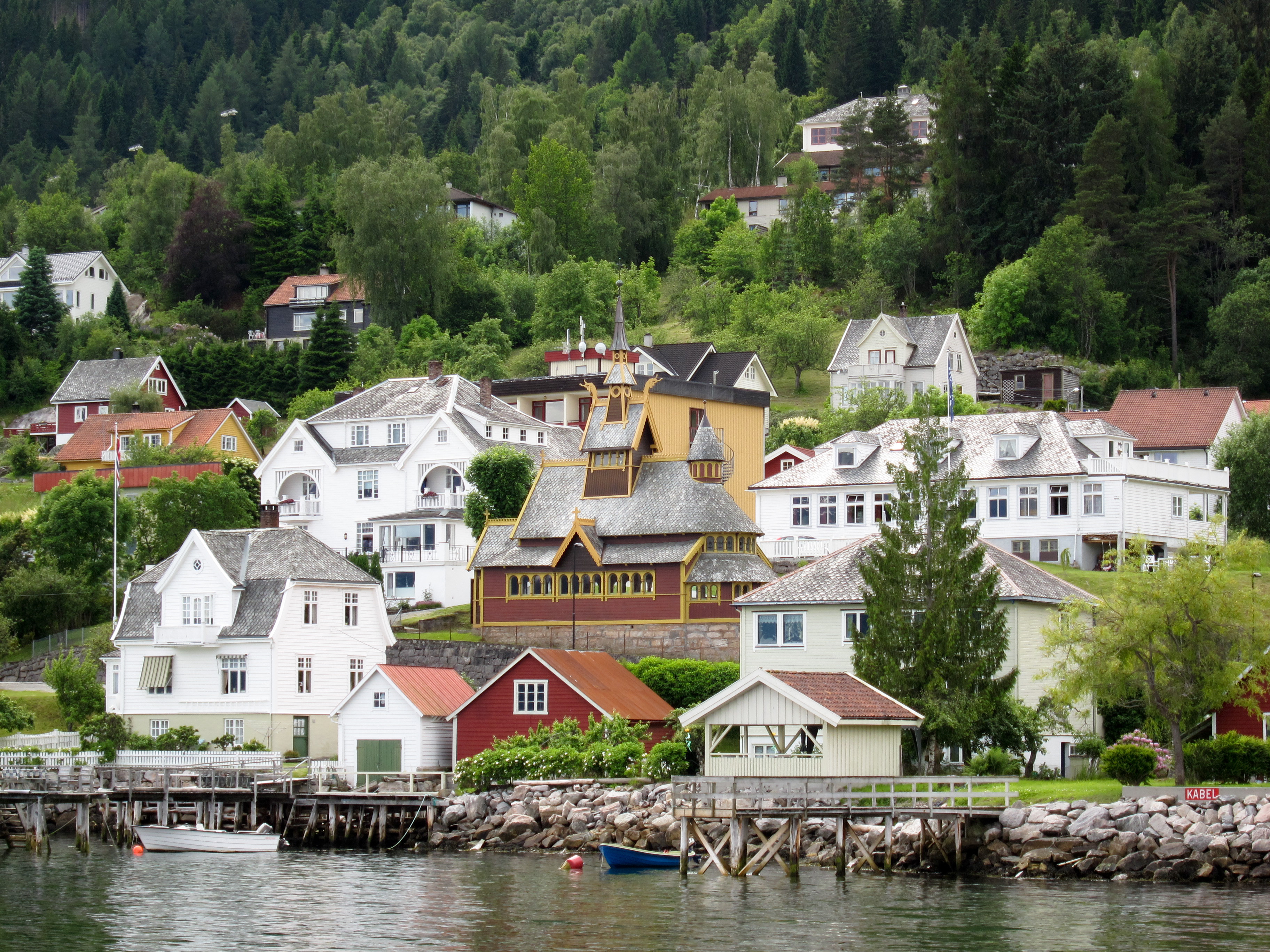 Balestrand